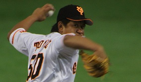 Giants tone